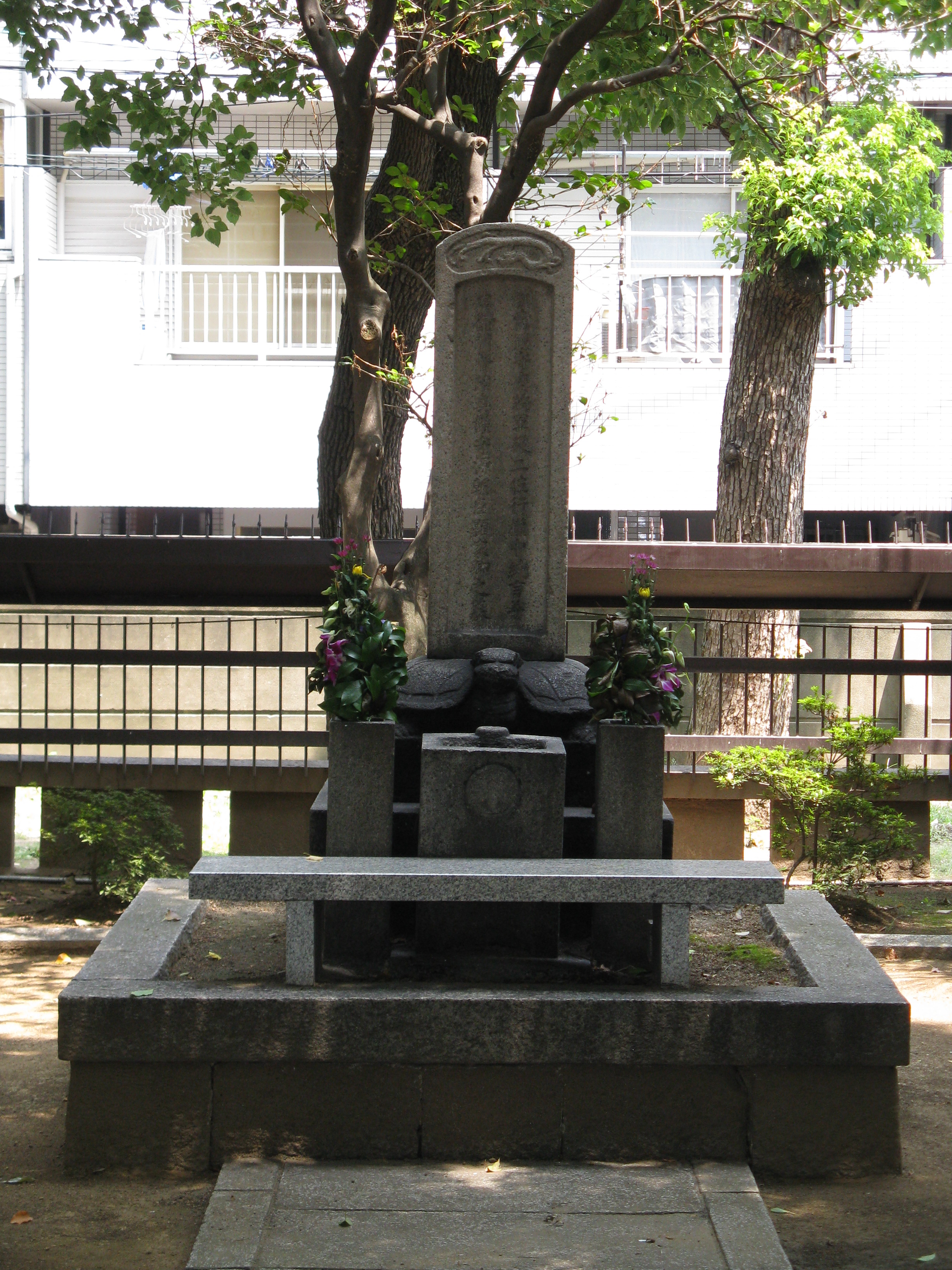 伝 北畠顕家の墓